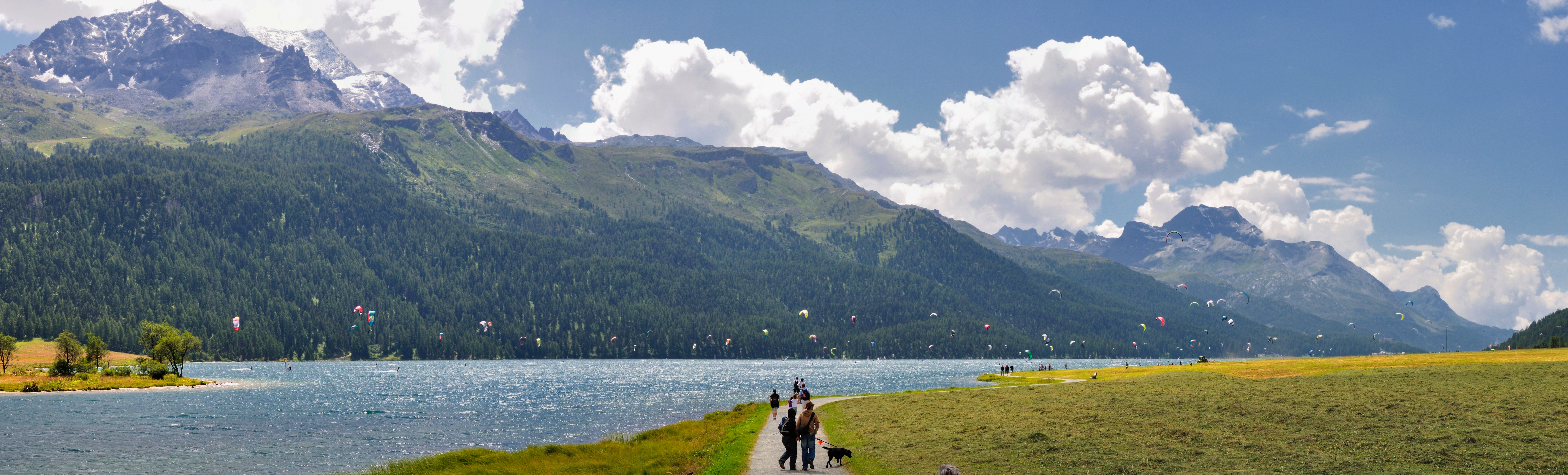 Switzerland, Graubünden, surfers and kite surfers on Lake Silvaplana